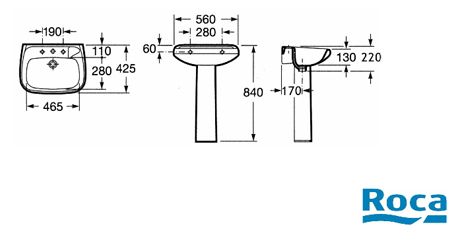 unos baños químicos